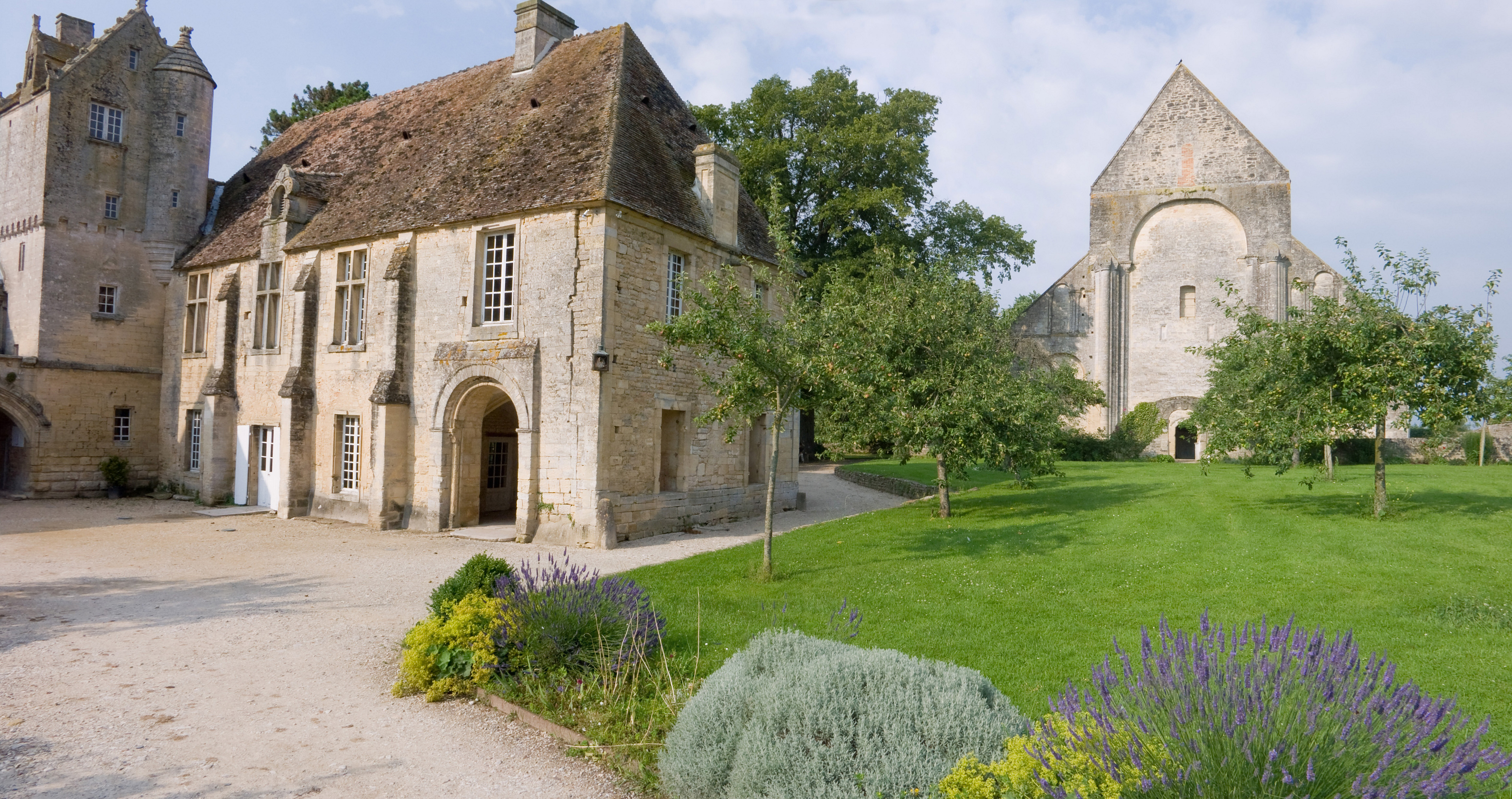 Panorama de l'ancien prieuré de Saint-Gabriel Brecy (Calvados, France), transformé en école d'horticulture